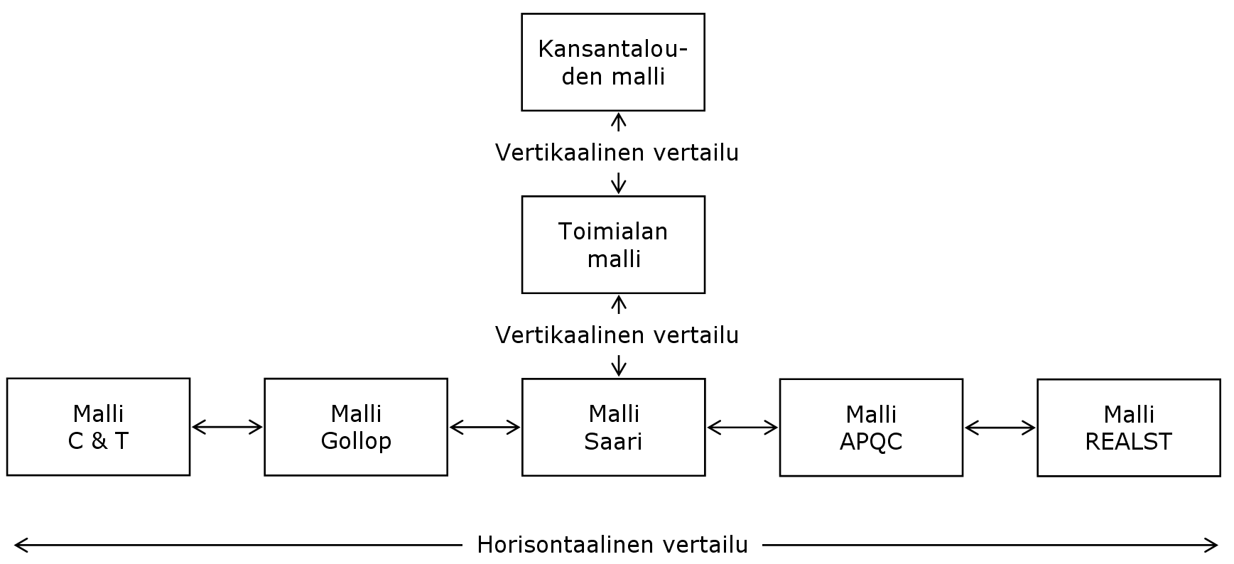 Tuottavuusmallivertailun periaate